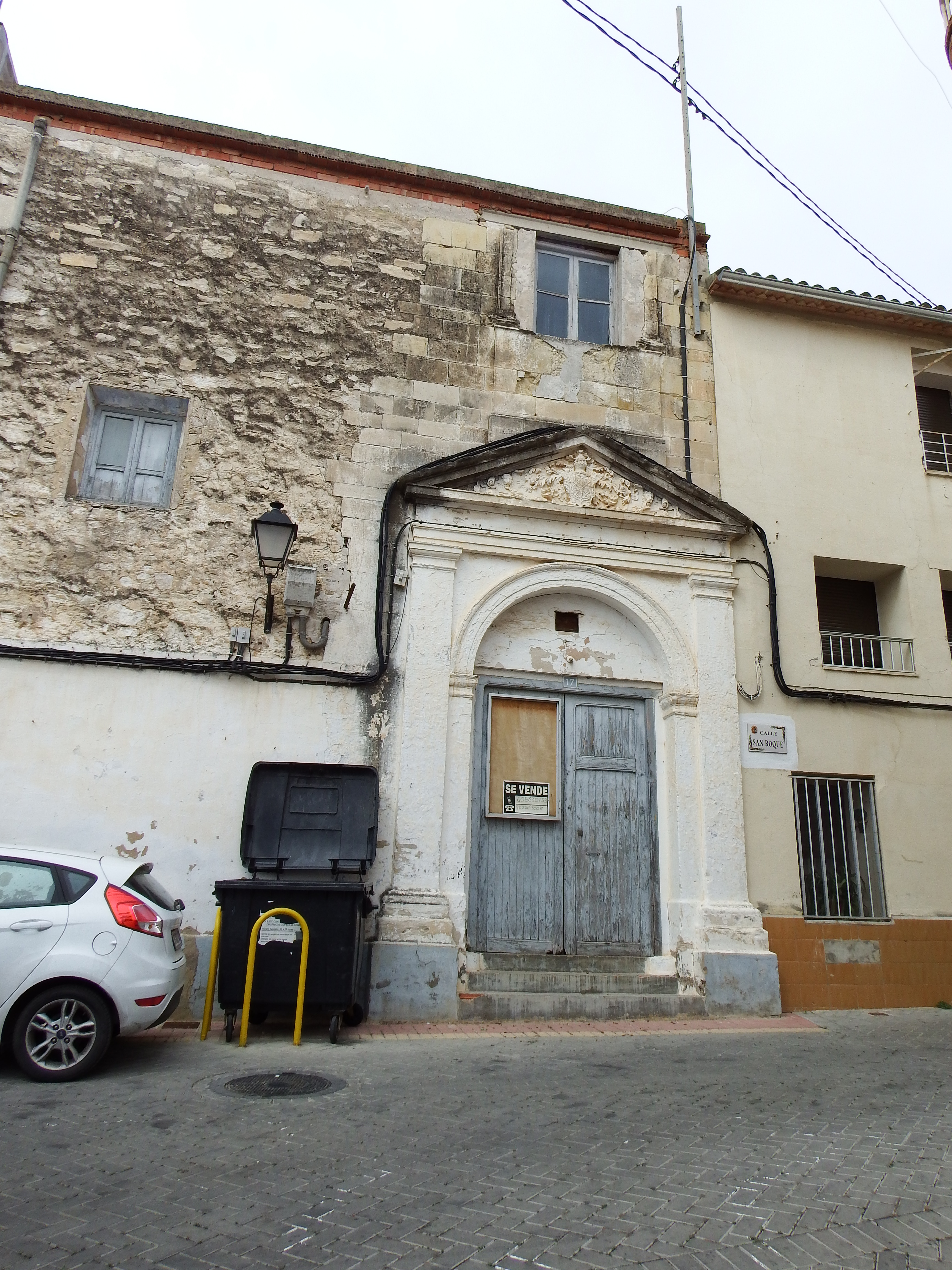 Imágenes diversas de Bicorp, La Canal de Navarrés